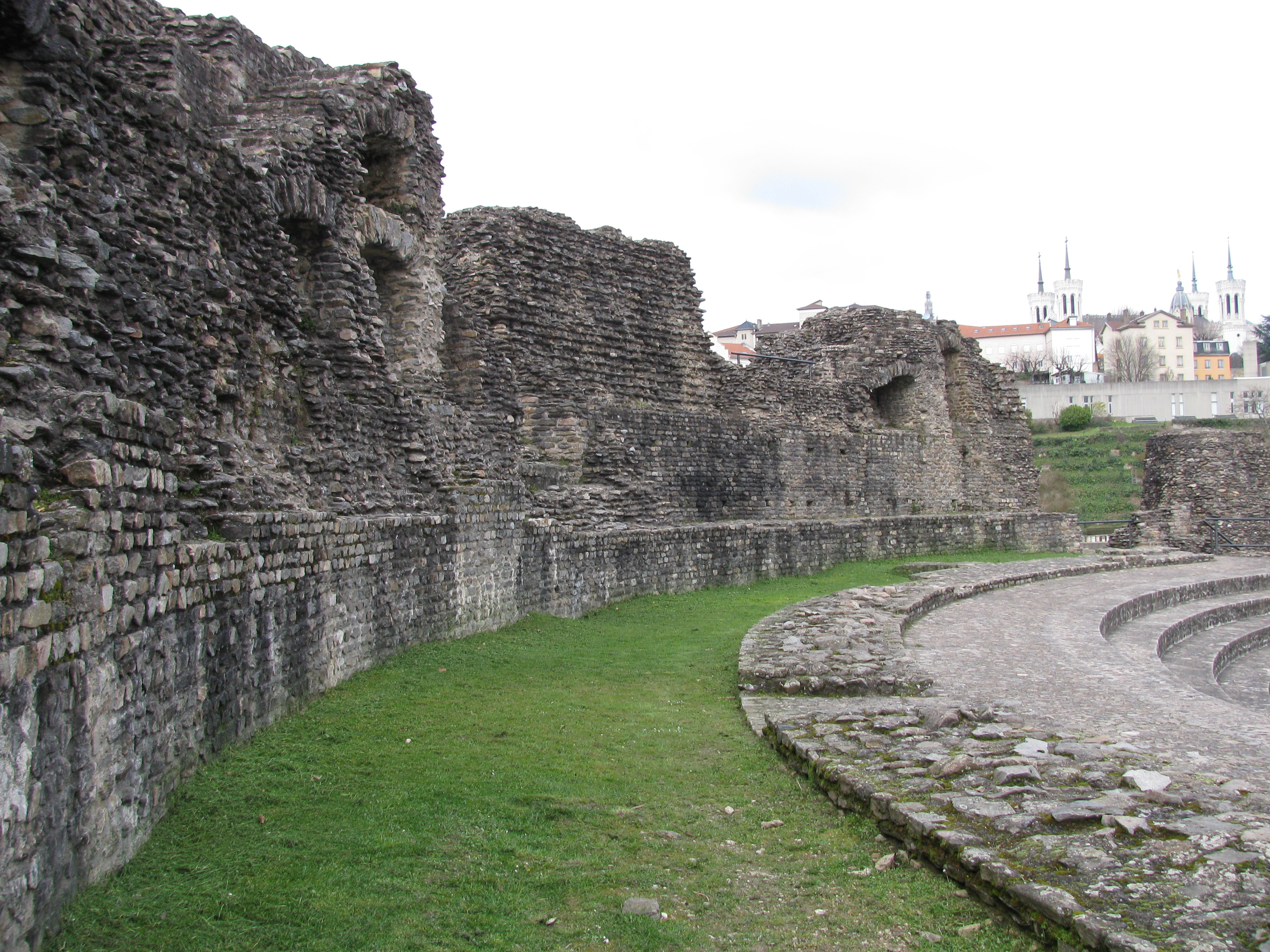 Odéon antique de Lyon. Niveau au-dessus de la série de gradin, vestiges de la galerie intérieure (gazon) séparée par un mur du palier de precinction à droite